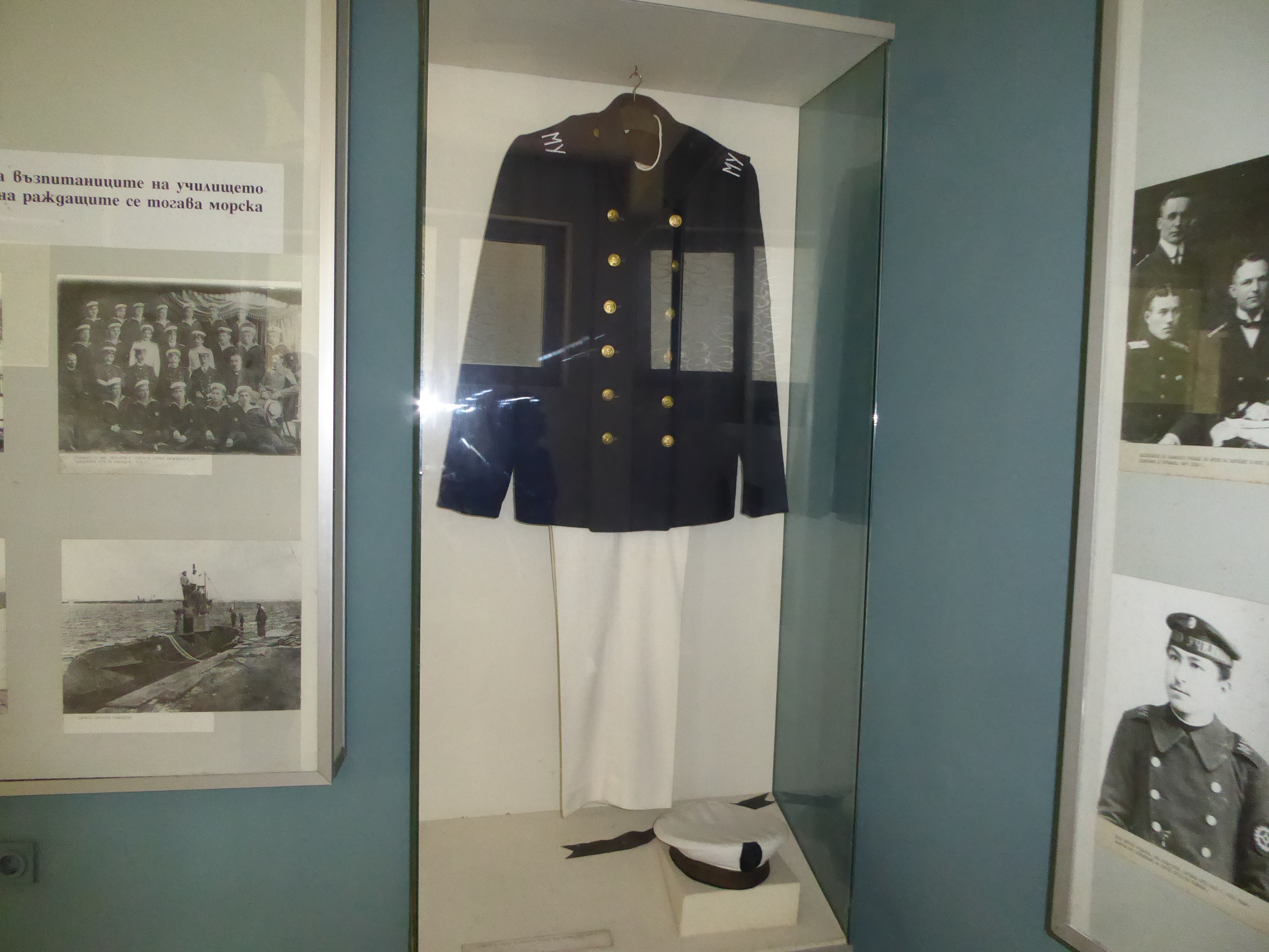 Marineakademie Warna-Historische Uniform